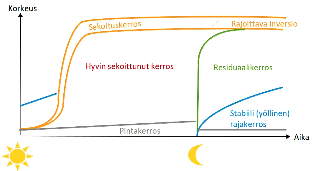 Ilmakehän rajakerroksen rakenteen vuorokausisykli maalla selkeänä kesäpäivänä.